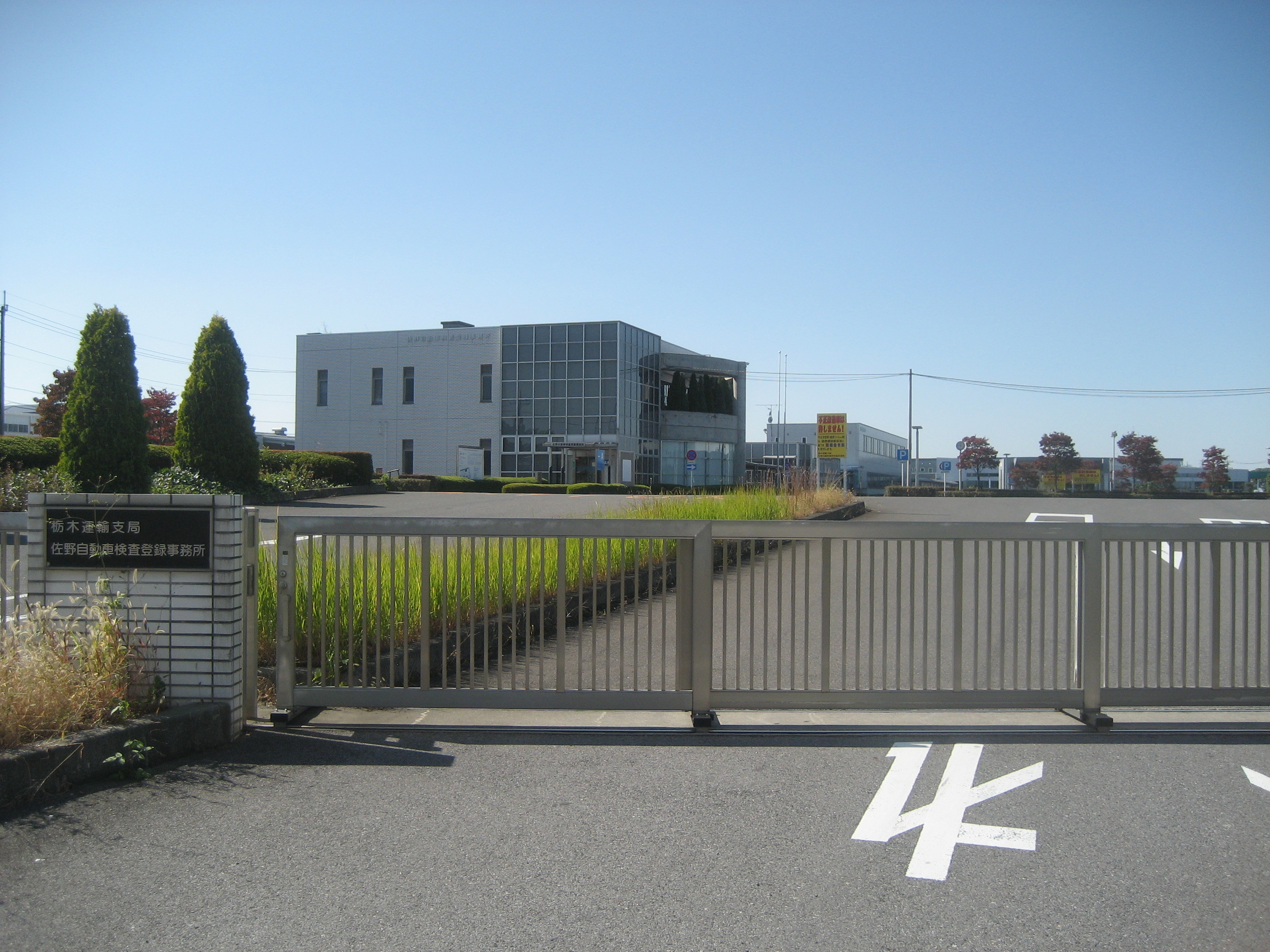 栃木運輸支局佐野自動車検査登録事務所庁舎（東側を撮影）